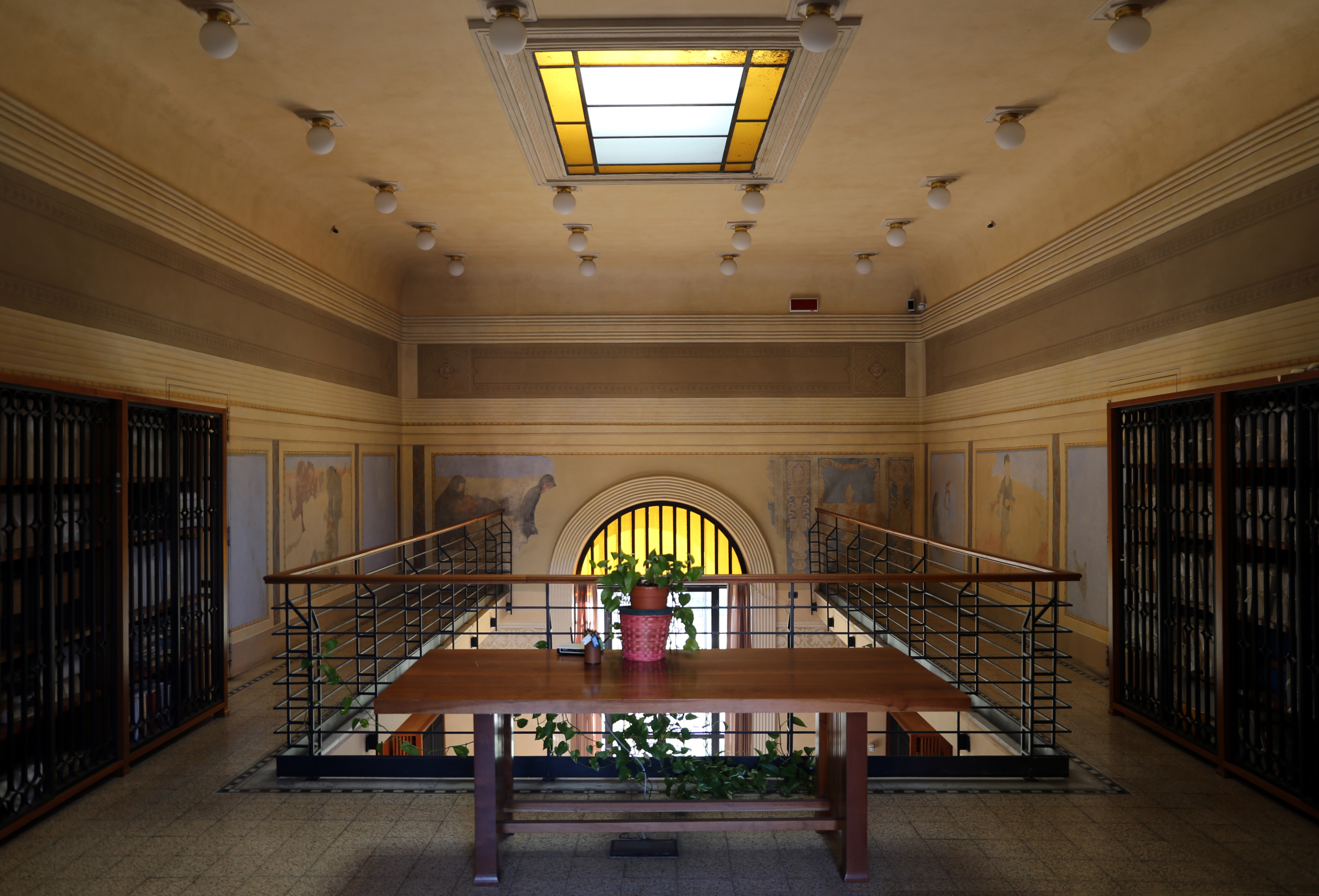 Sezione di Archivio di Stato di Pescia This is a photo of a monument which is part of cultural heritage of Italy.